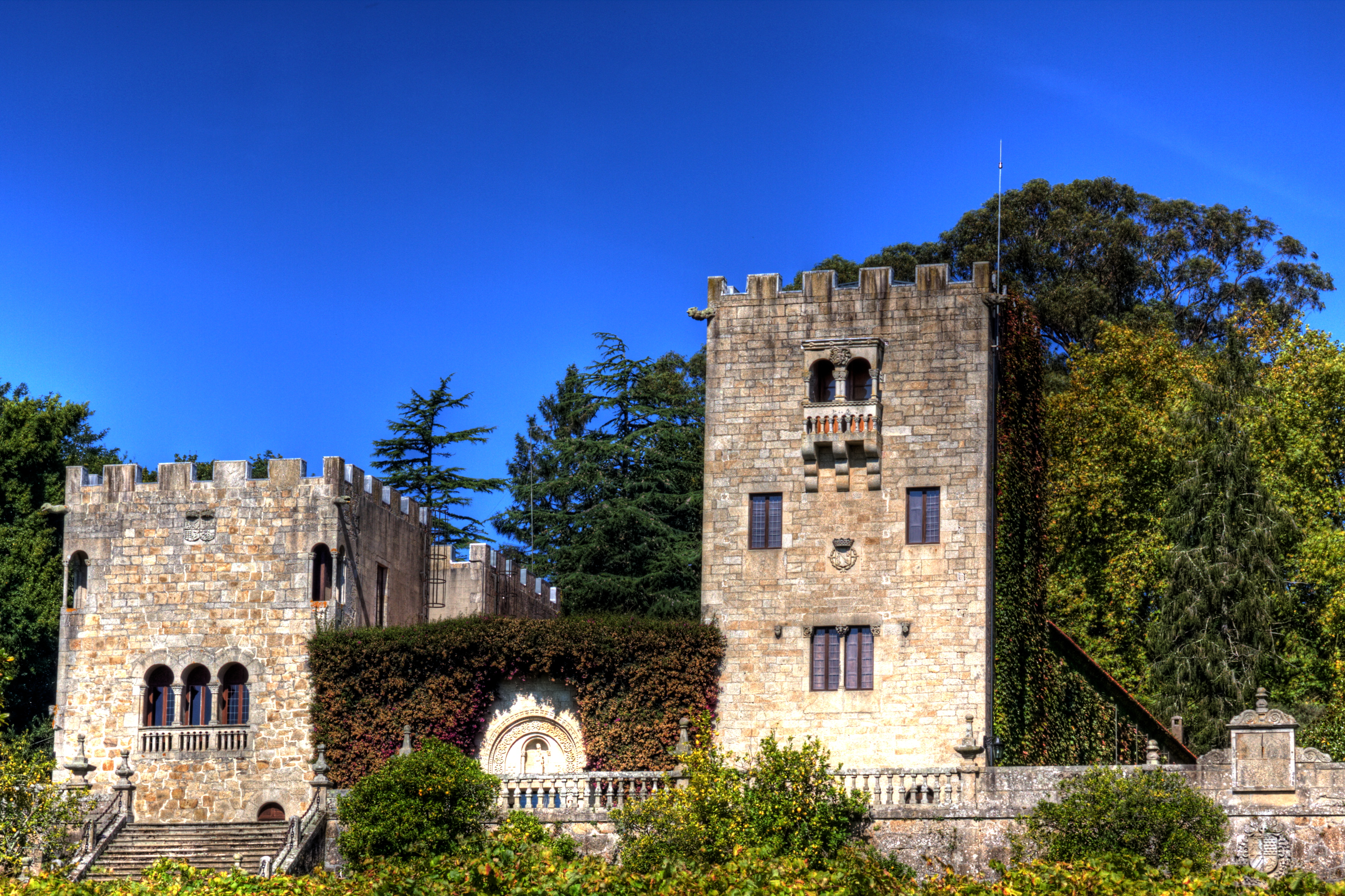 Pazo de Meirás - Sada (A Coruña)